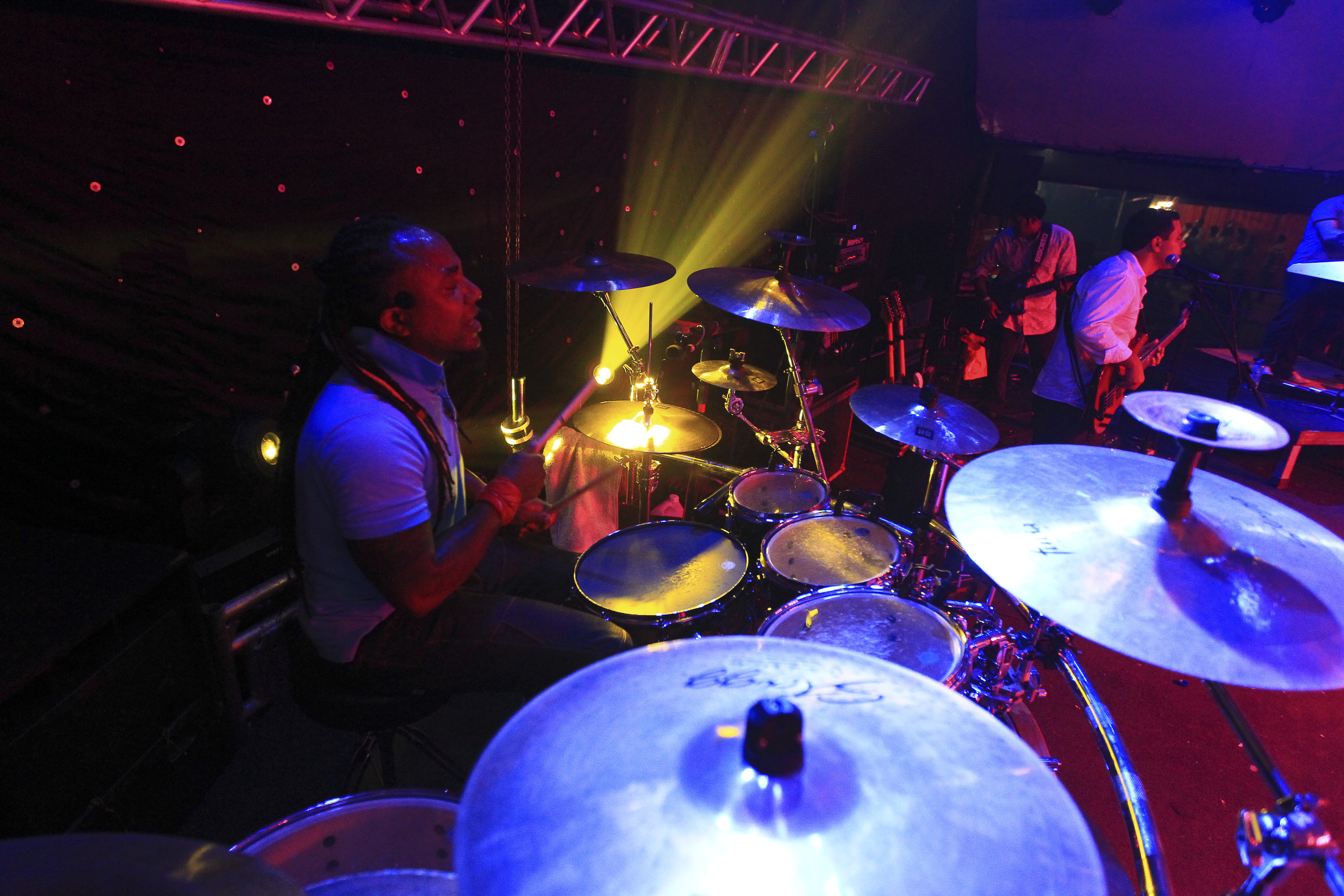 André Mattos, baterista do Trazendo a Arca, durante apresentação.